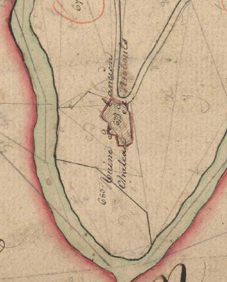 El castell de Nyòvols en el Cadastre napoleònic del 1812 (Arxius Departamentals dels Pirineus Orientals)